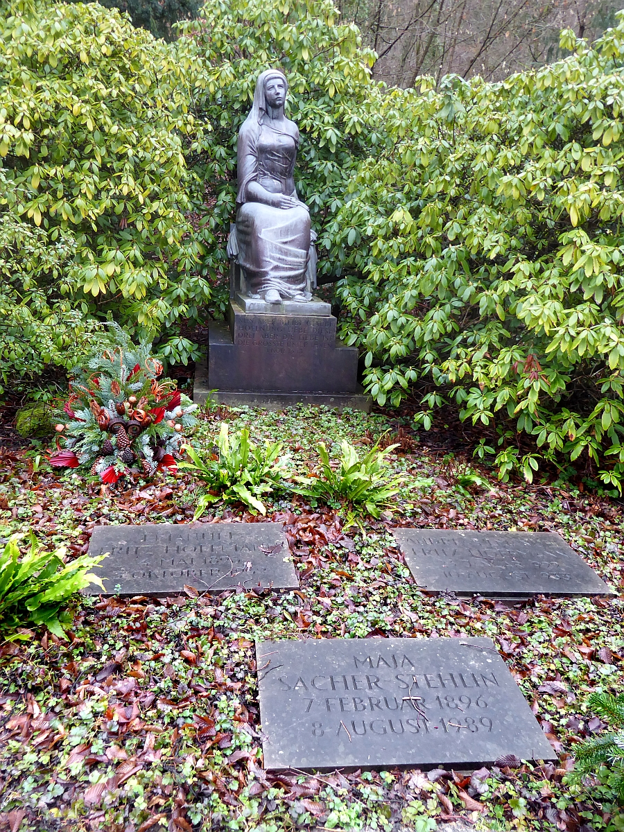 Emanuel Fritz Hoffmann-Stehlin (1896–1932) Vizedirektor F. Hoffmann-La Roche & Co. in Basel, Kunstsammler, u.a. von Marc Chagall, James Ensor, Mirò, Max Ernst, Paul Klee, Pablo Picasso. Grabskulptur in Bleiguss von Aristide Maillol (1861–1944)